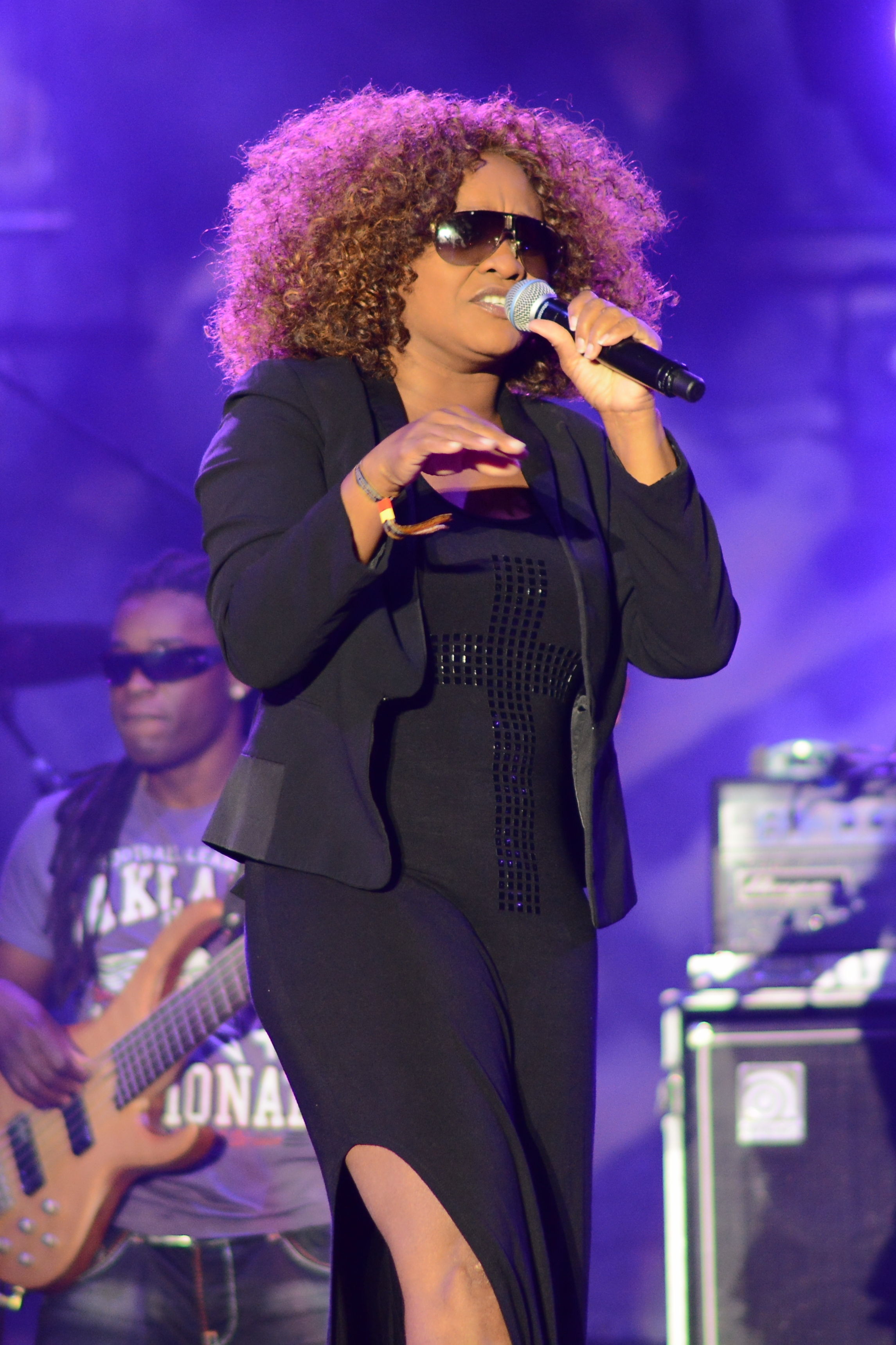 Tanya_Stephens beim Ruhr Reggae Summer in Mülheim